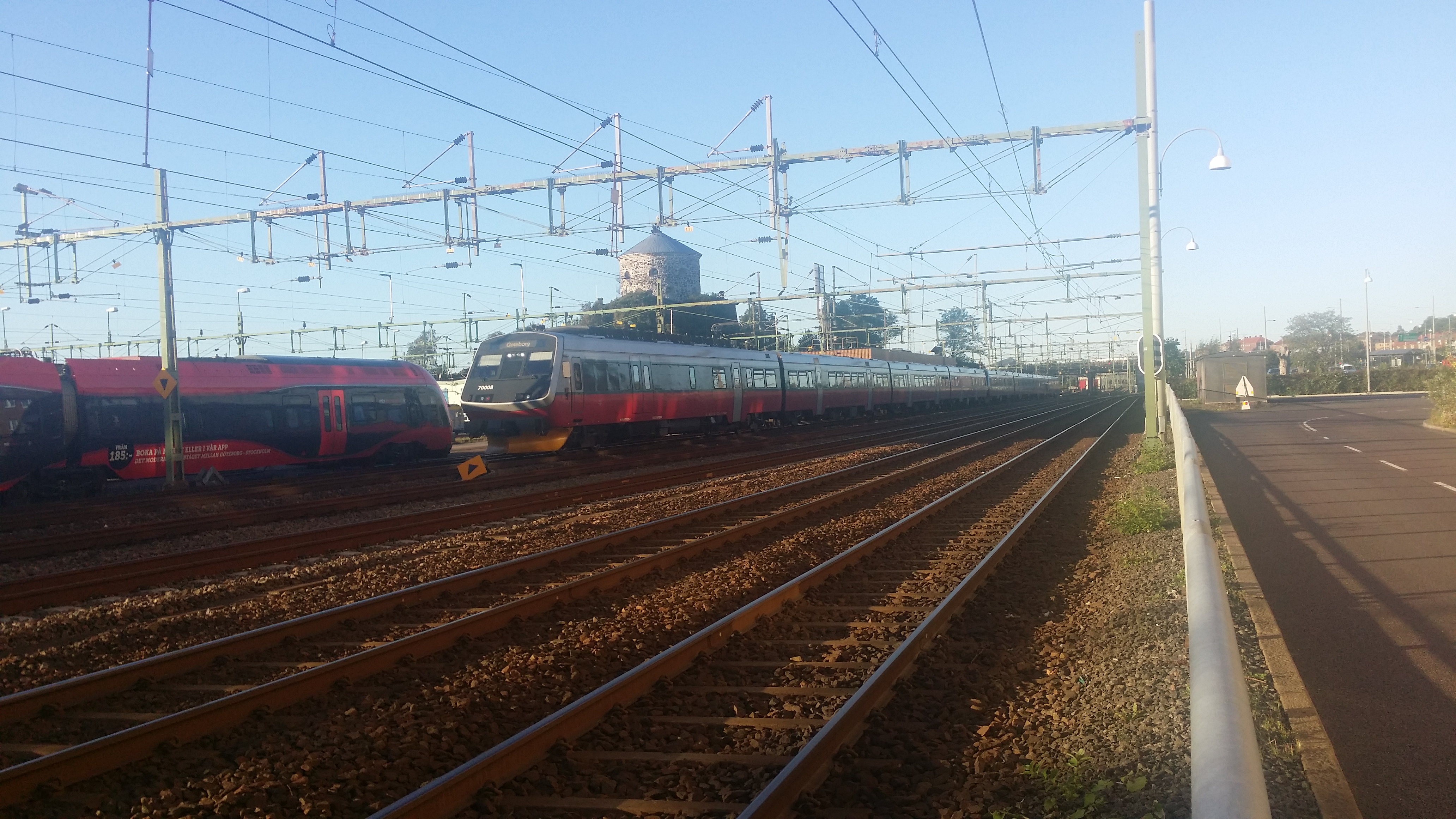 Tog fra Oslo like før ankomst Gøteborg.